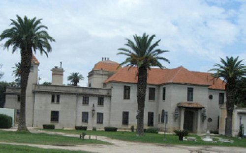 Señorial mansión en la Estancia Residencial El Durazno, donde vivieron Ambrosio Olmos y su esposa; luego del fallecimiento de Olmos, fue la residencia favorita de Adelia María Harilaos de Olmos en Córdoba.